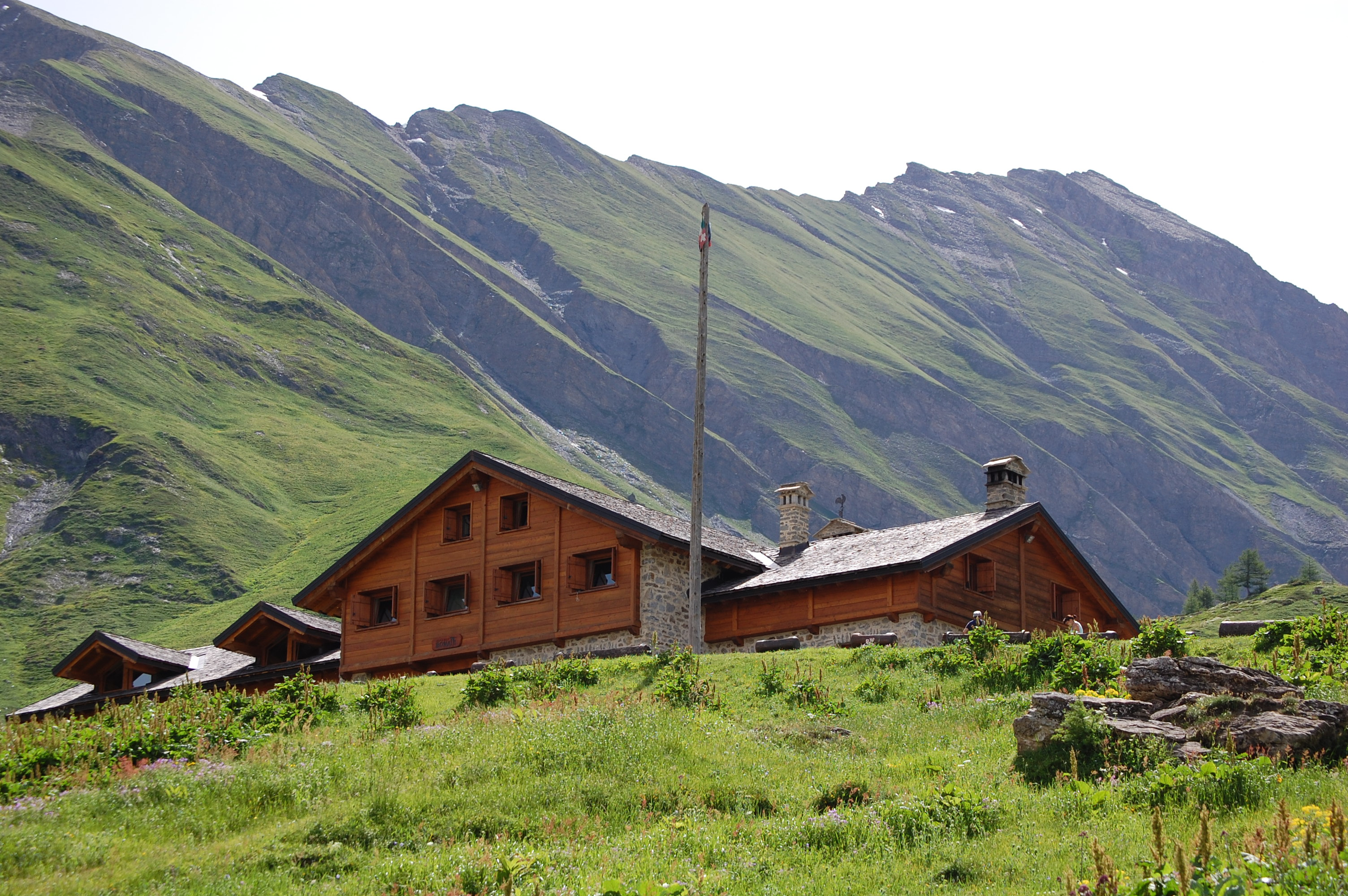 Rifugio Walter Bonatti - Valle d'Aosta - Alta Via 1